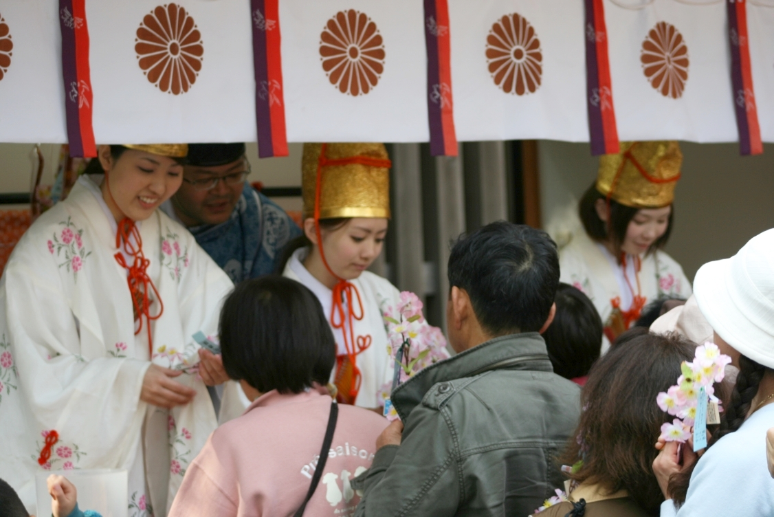 福井県敦賀市金崎宮の花換まつりの様子。福娘と桜の小枝を交換する。